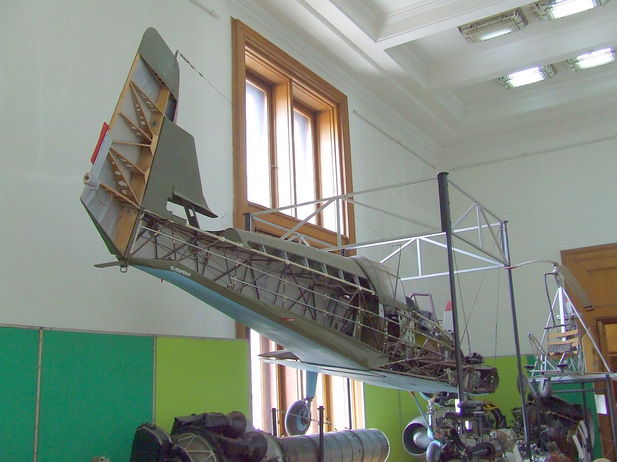 LWD Junak 3, Muzeum Techniki, Warszawa